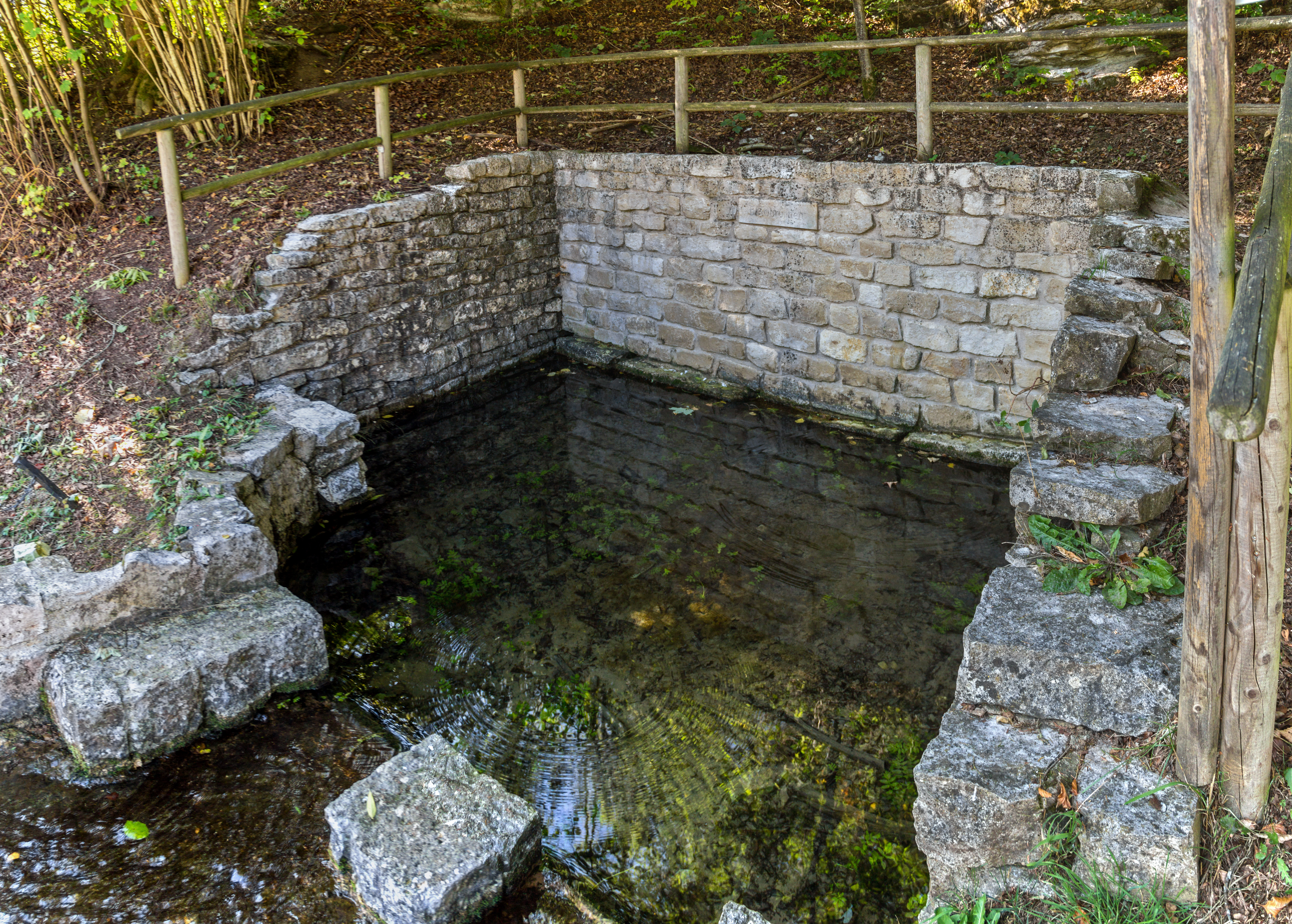 Blaubrunnen, Karstquelle, Altdorf, Titting, Geotop